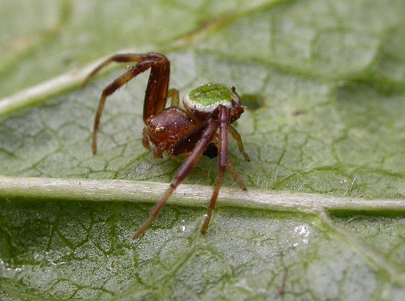 Ebrechtella tricuspidata mâle = Misumenops tricuspidatus